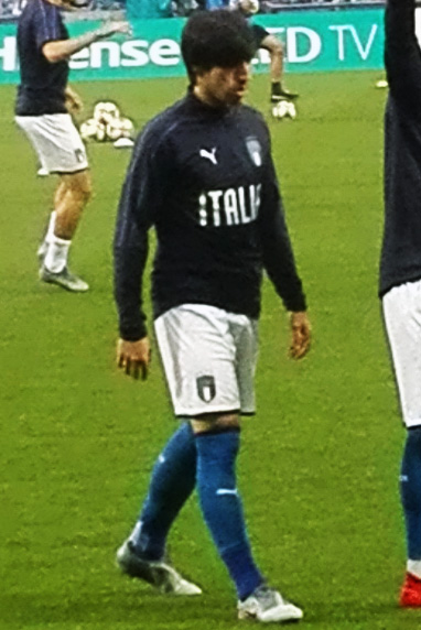 Sandro Tonali e Claud Adjapong nel riscaldamento prepartita di Belgio-Italia, gara valevole per gli europei Under-21.